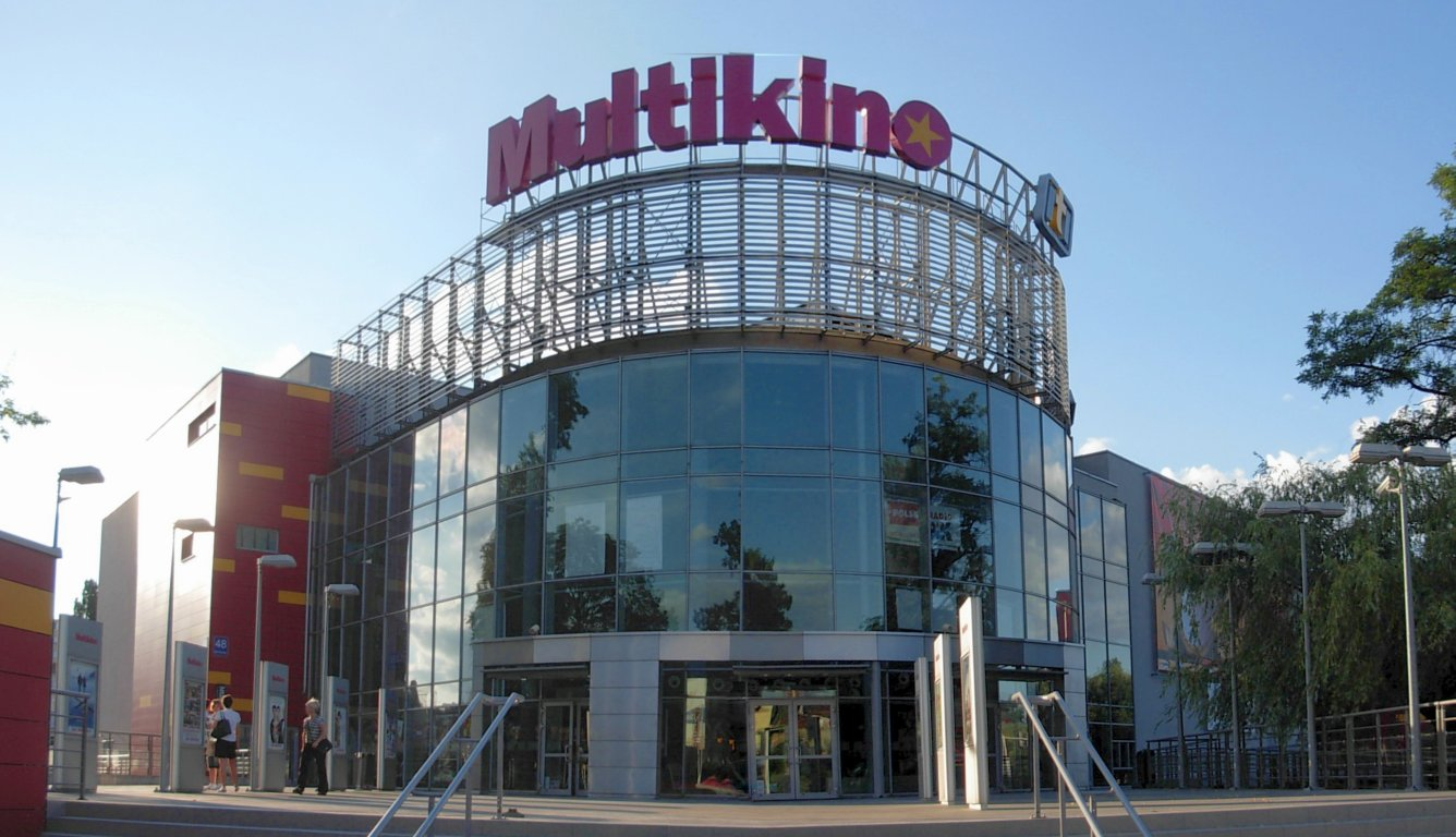 Multikino w Bydgoszczy